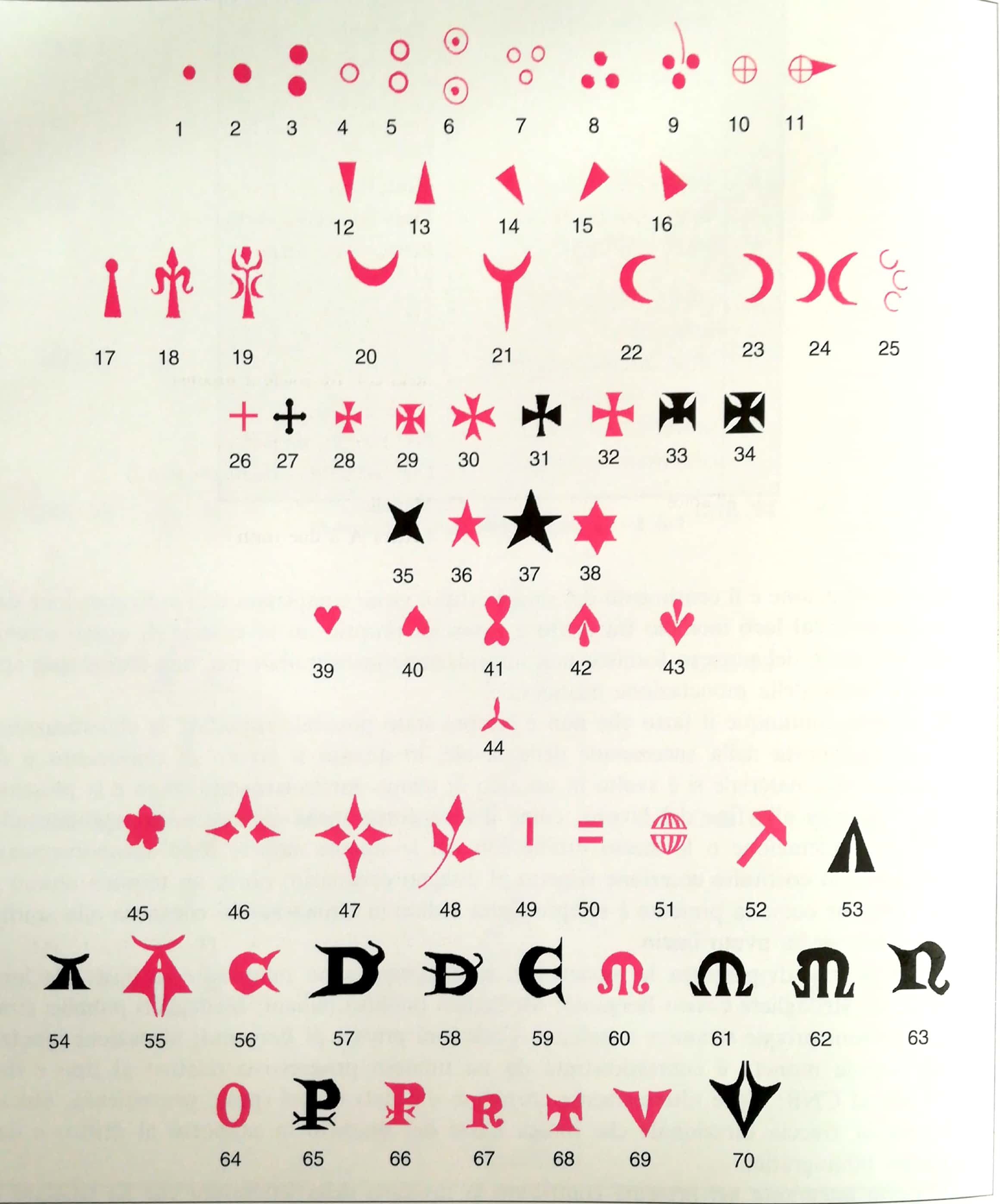 tabella segni di varianti